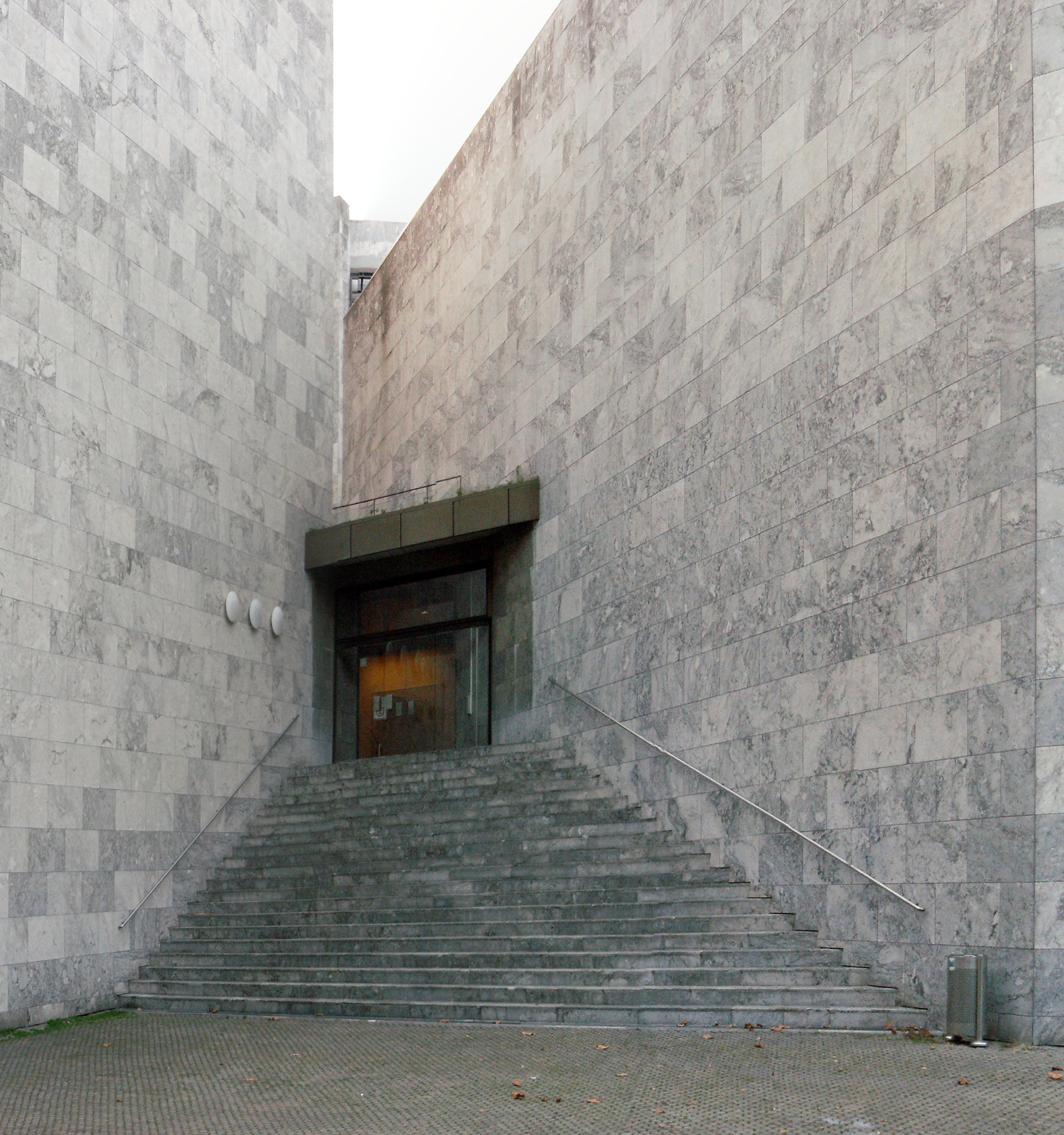 Geschlossener Zugang zur Straße "Am Rathaus" des Rathaus Mainz. Gleiches Bild wie Original nur mit DxO geradegerückt und mit PSE verkleinert